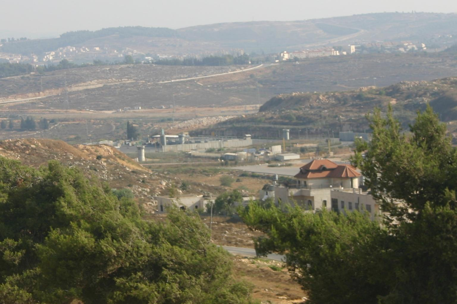 Sperranlage mit Warenterminal in Beitunia